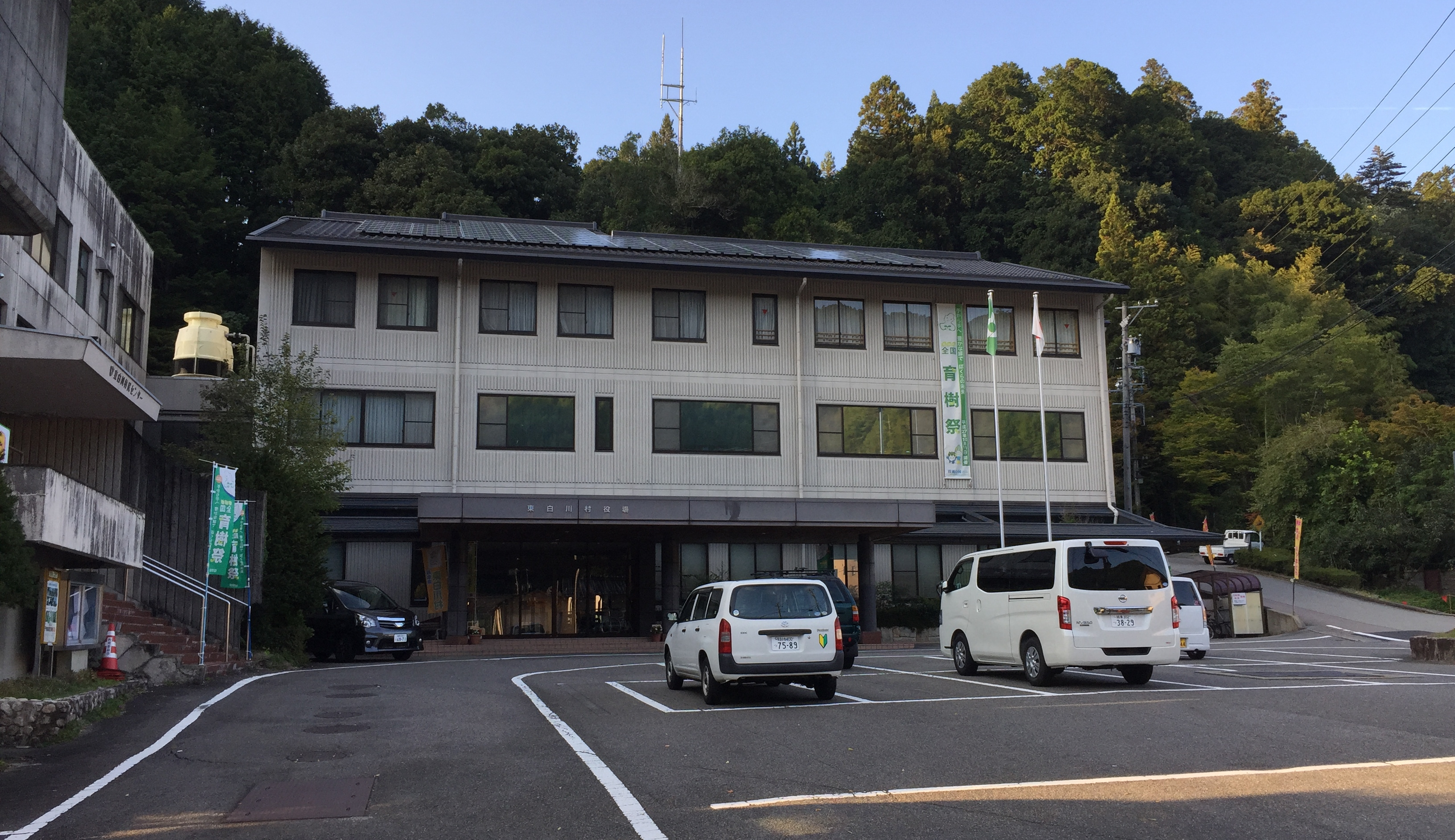 東白川村役場